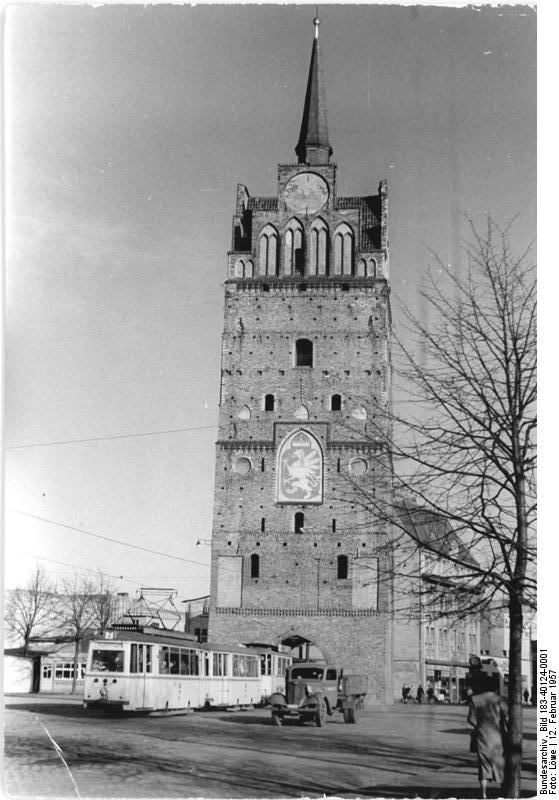 Rostock, Kröpeliner Tor, Straßenbahn Zentralbild/Löwe Weiß 12.2.1957 Rostock - Stadt der V. LPG-Konferenz vom 26. bis 28. Februar 1957 UBz: Das Kröpeliner Tor